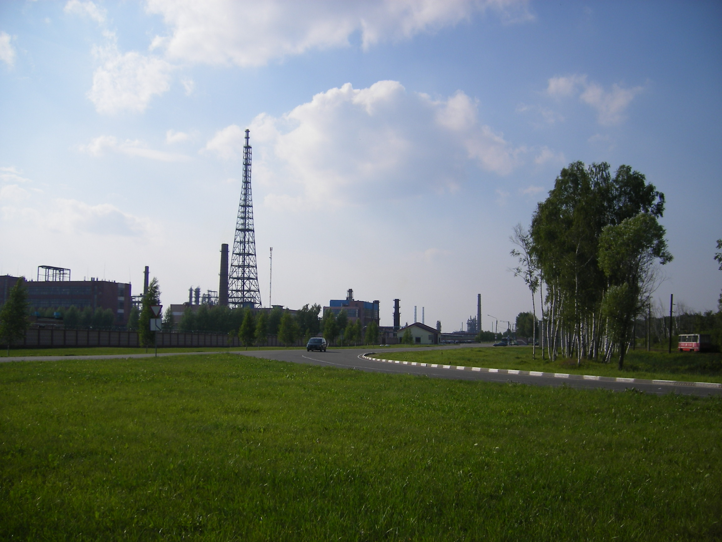 Navapolatsk chemical plant Polimir